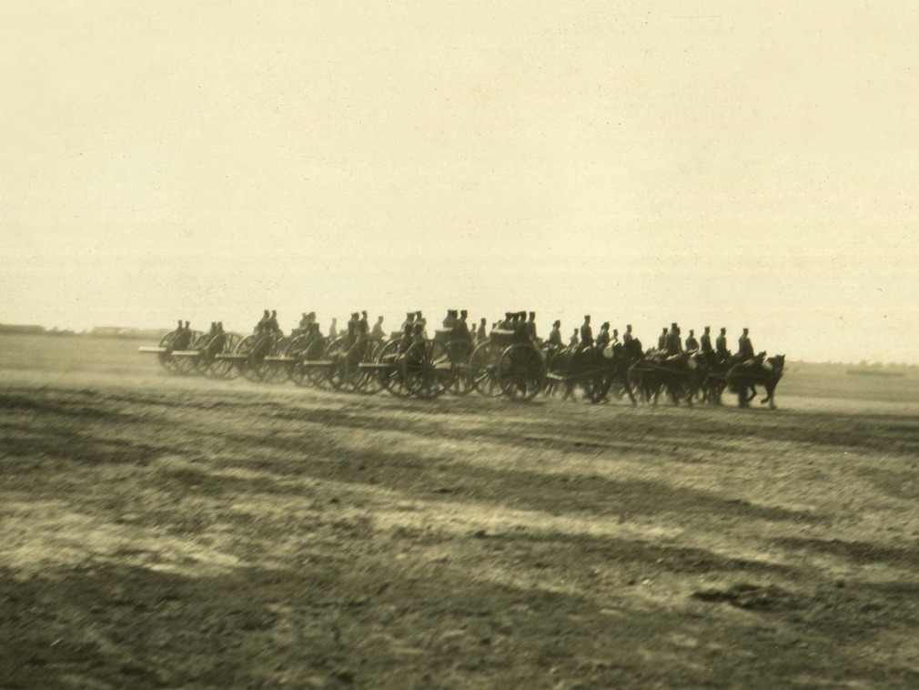 北洋軍砲兵隊。